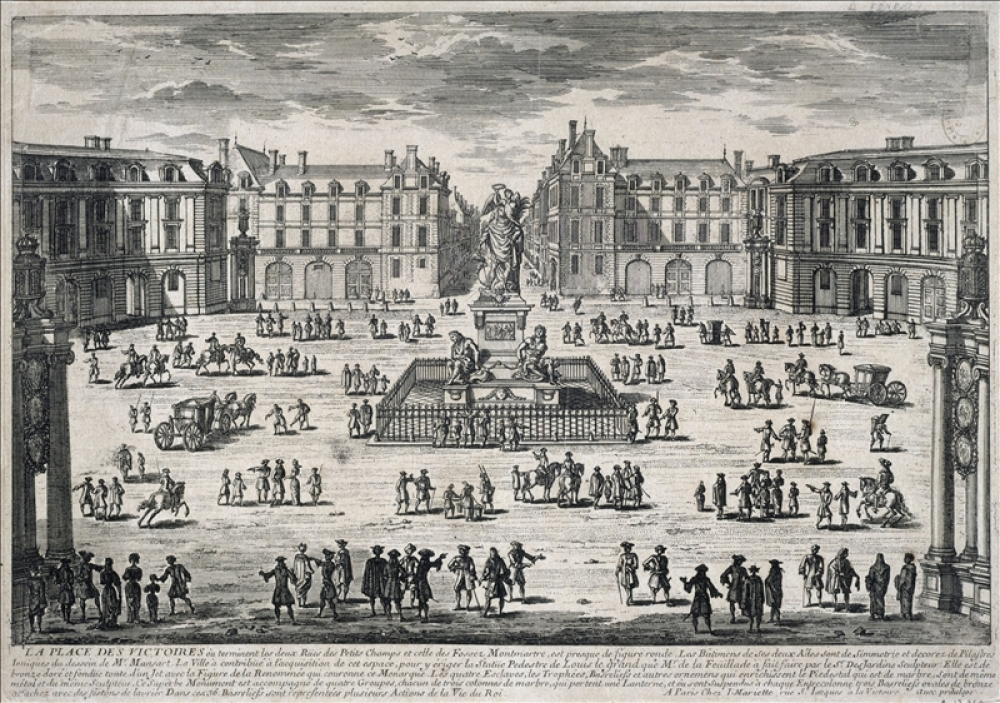 Aquarell: Place des Victoires (1660)